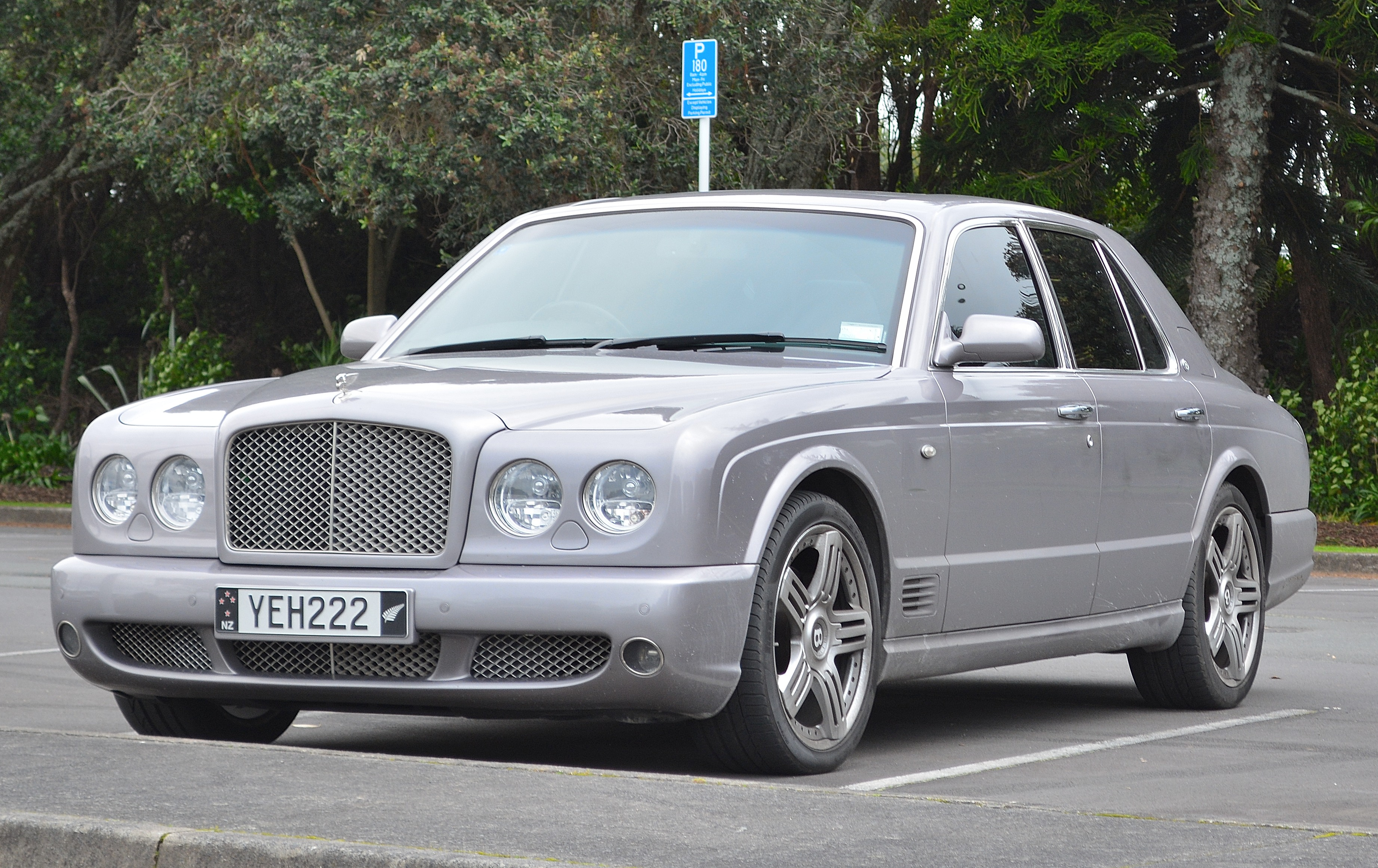 Auckland,New Zealand